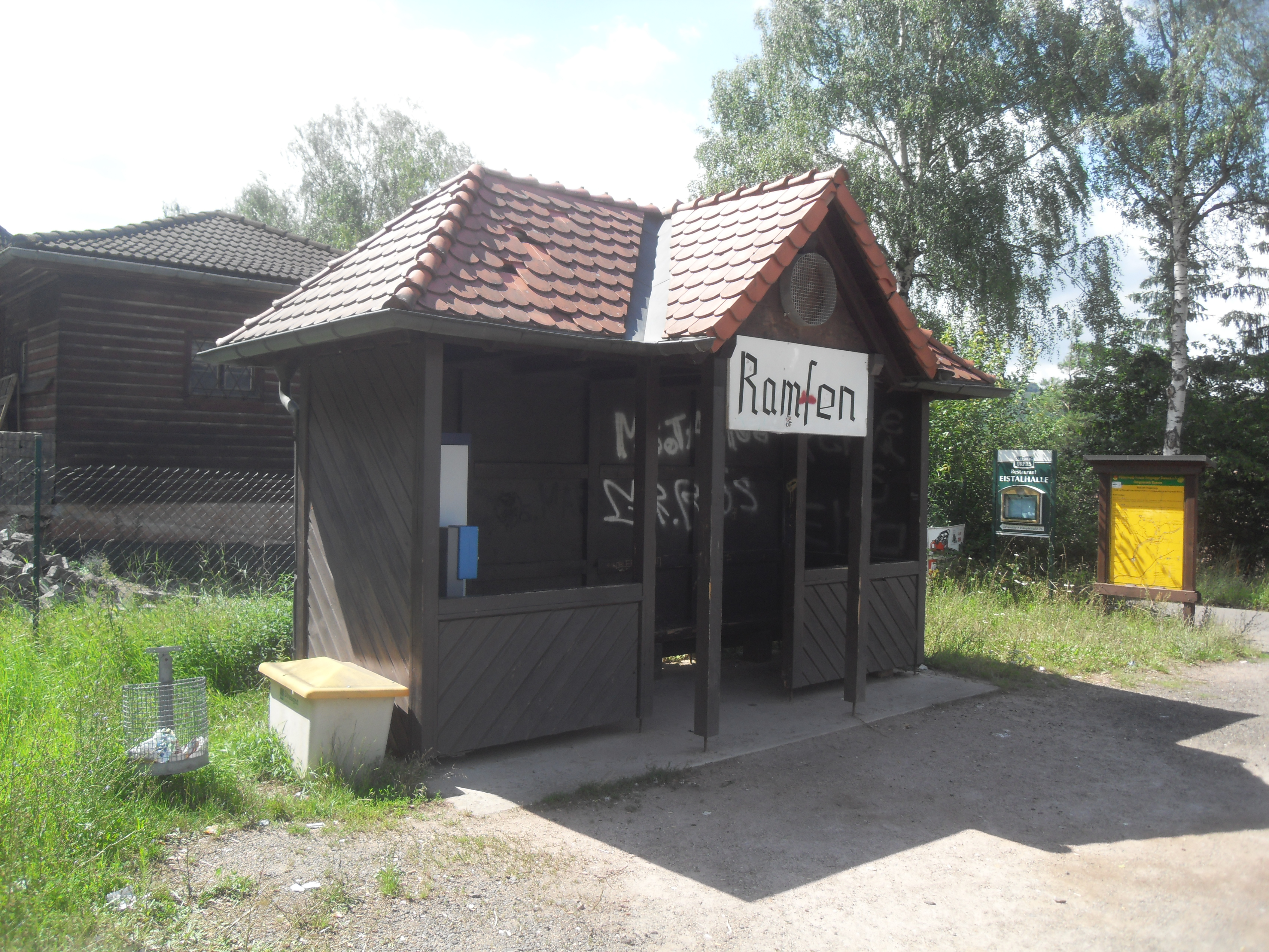 Bahnhofsgebäude des Bahnhofs in Ramsen (Pfalz)